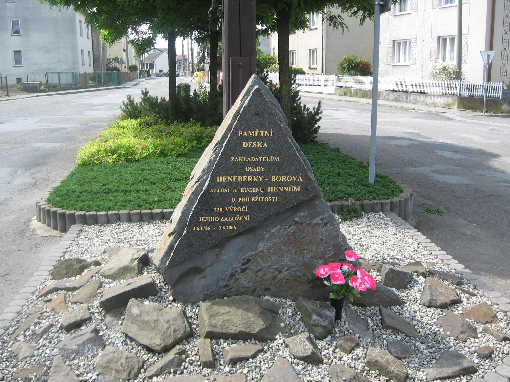 Pamätník založenia obce